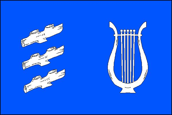 Vlajka obce Podmokly (okres Klatovy)